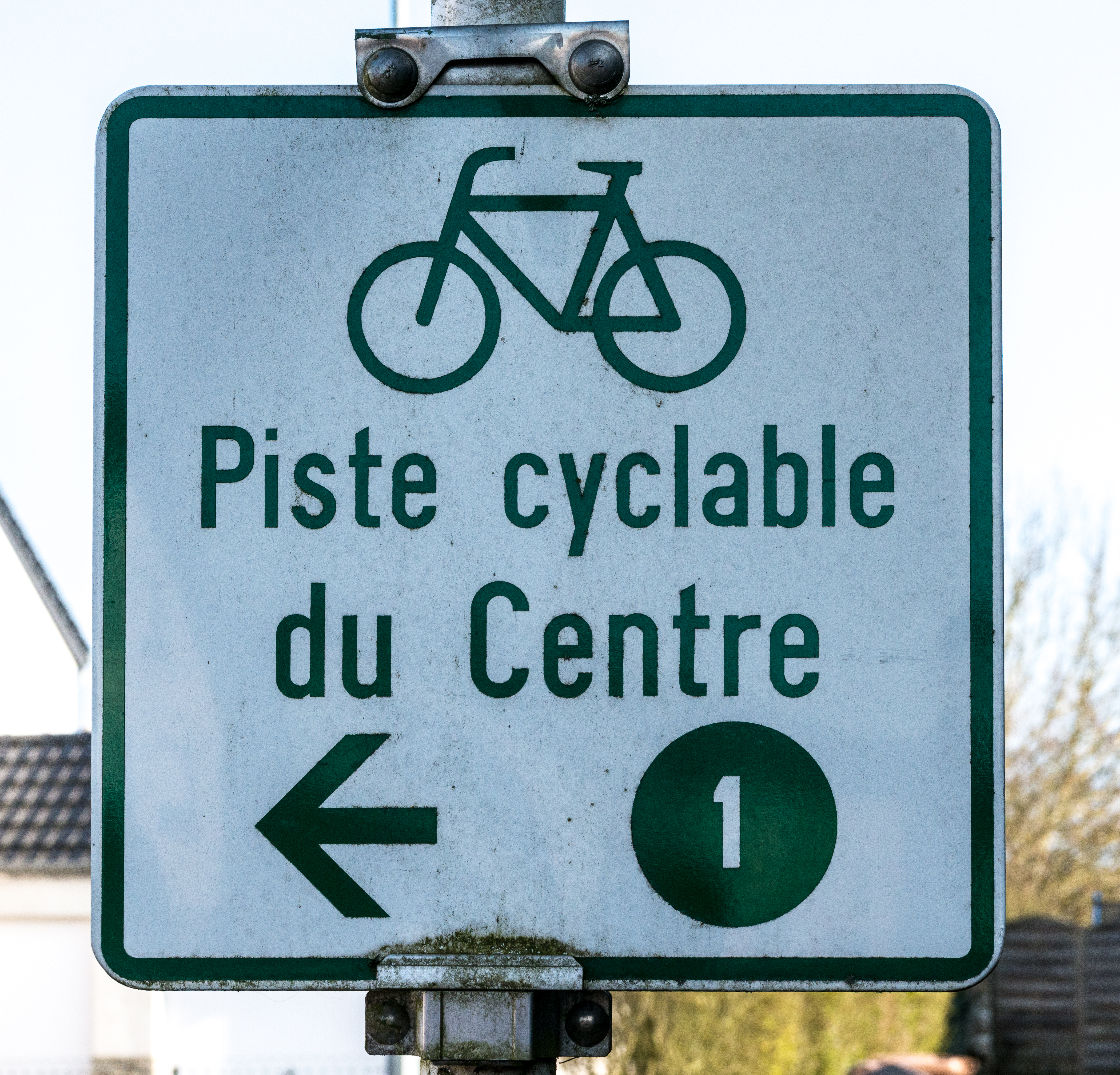 Vëlosschëld Piste cyclable du centre (PC1) zu Fenteng.